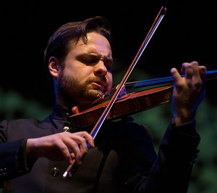 دالیبور کاروای در جشنواره موسیقی فجر٬ تالار رودکی - بهمن ۱۳۹۴